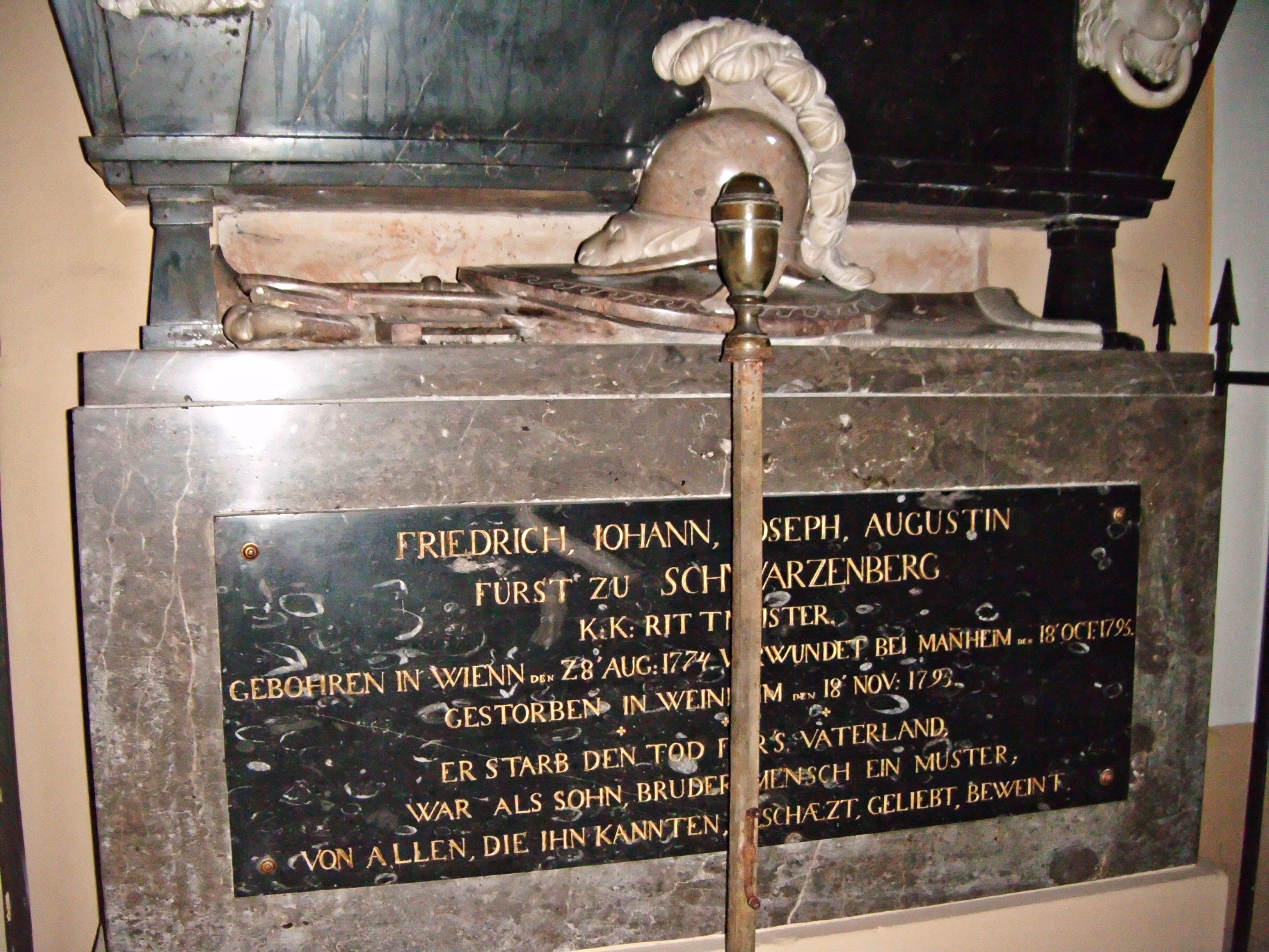 Friedrich Johann Nepomuk zu Schwarzenberg (1774-1795), Inschrift auf seinem Grab in der Kirche St. Laurentius Weinheim